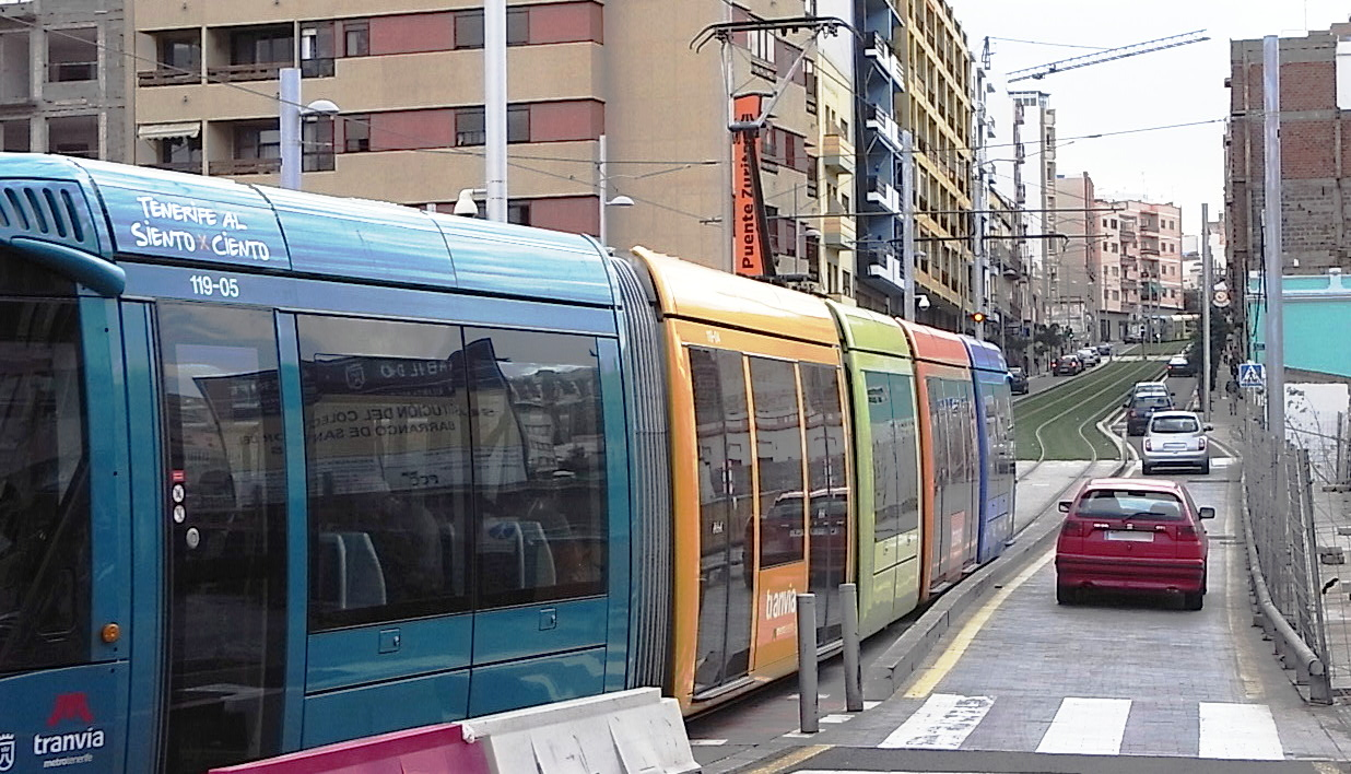 Santa Cruz de Tenerife, tramoj ĉe haltejo "Puente Zurita".